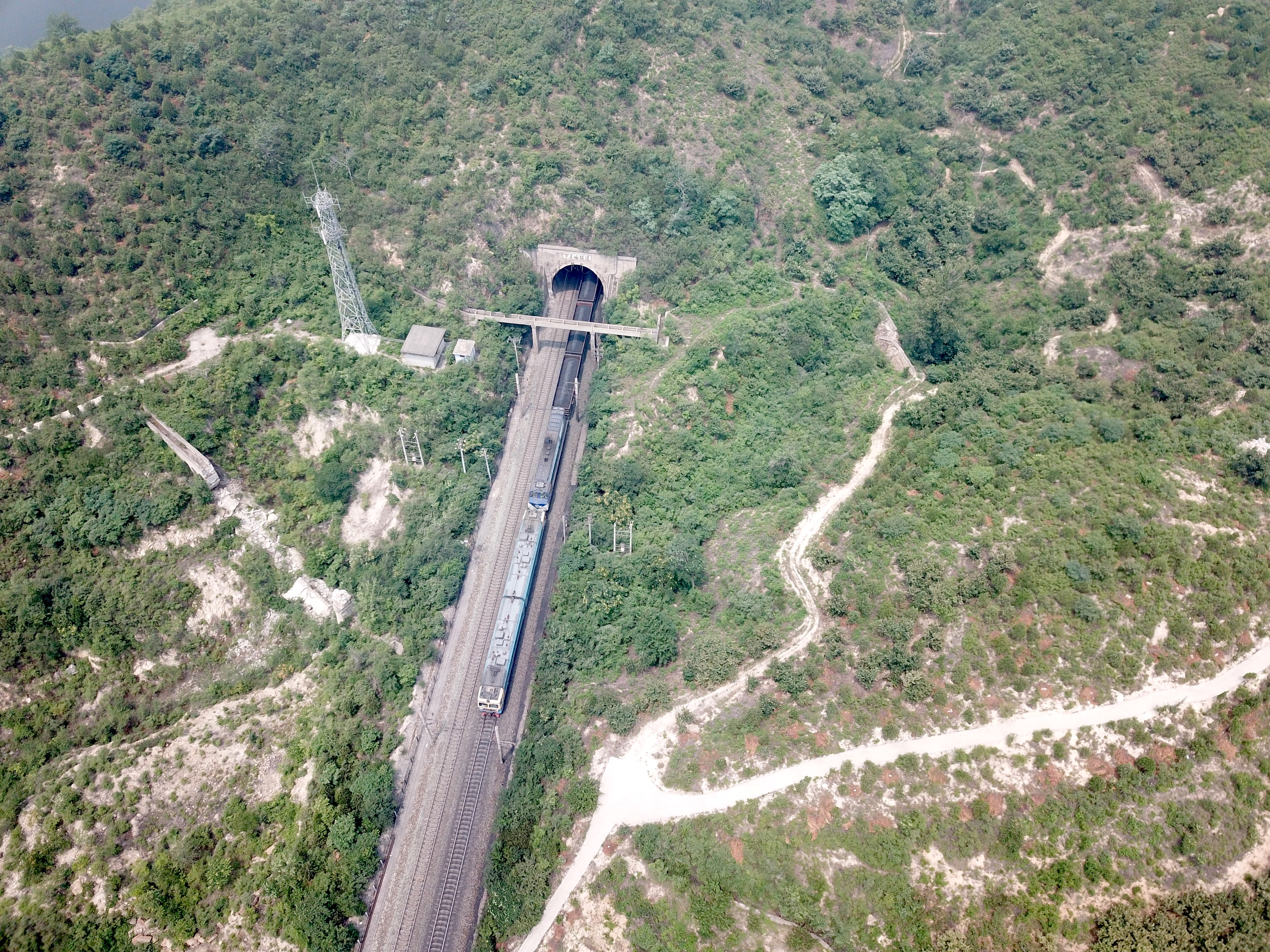 中文（中国大陆）: 大秦铁路下莊站附近